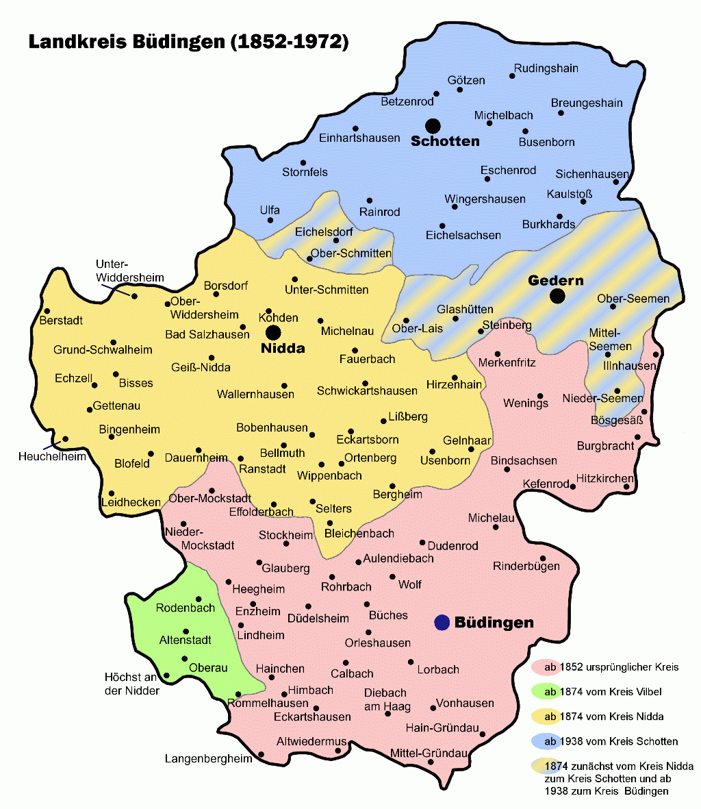 Übersichtskarte des Landkreises Büdingen (1852-1972).